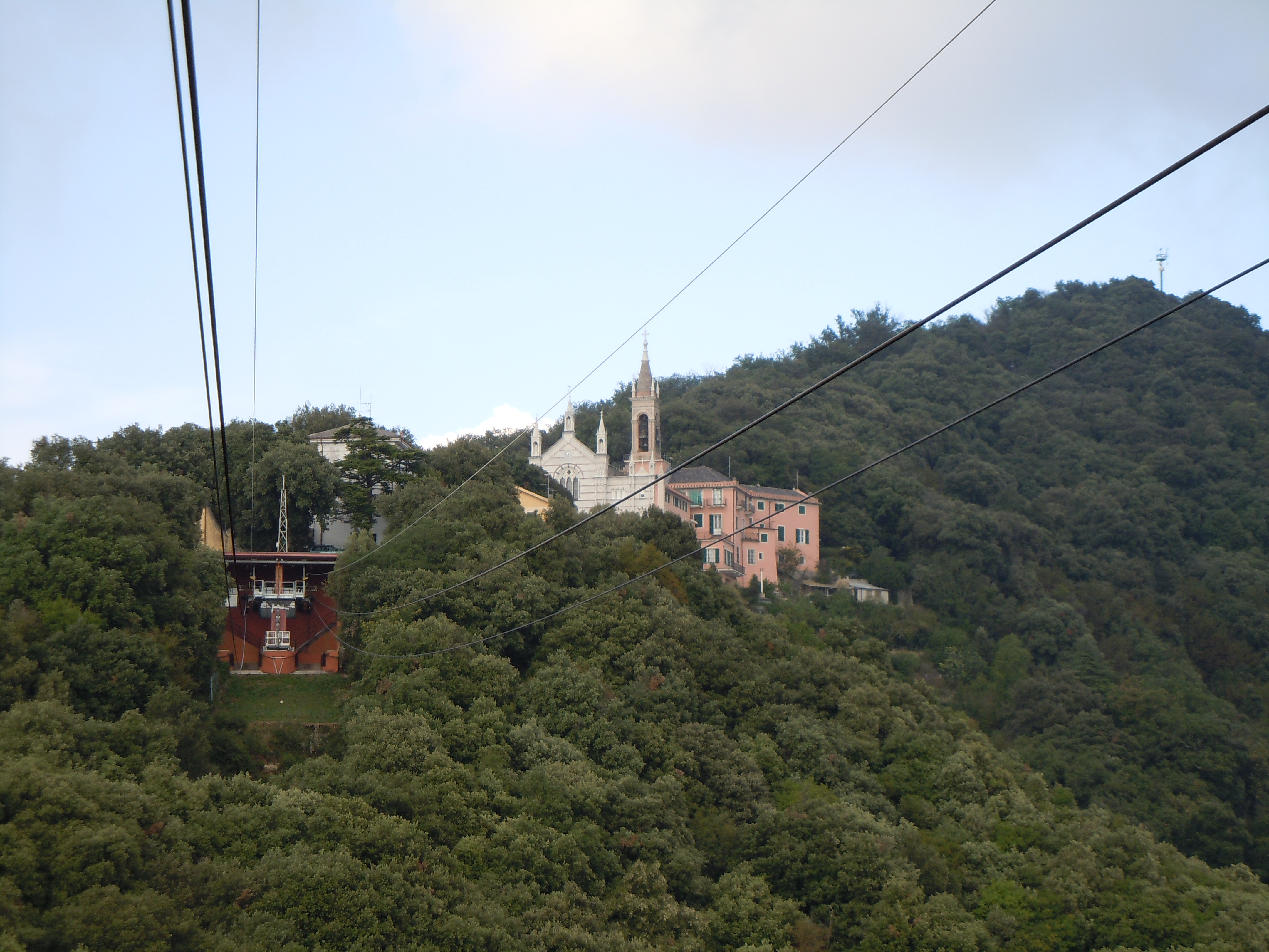 La stazione a monte della funivia Montallegro + il Santuario